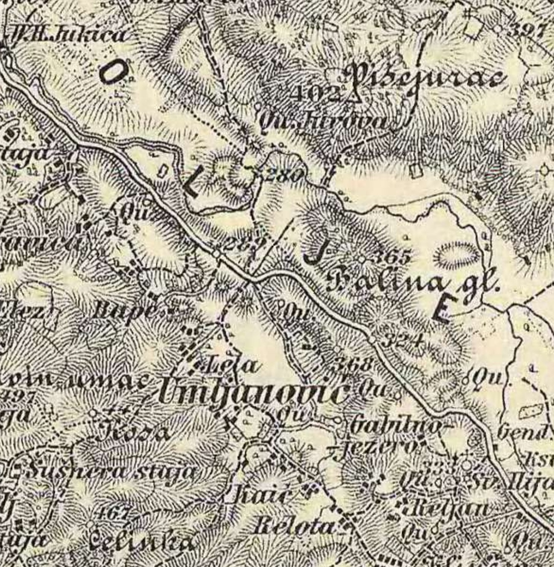 Mapa Umljanovića i okolice iz Habsburškog carstva iz 1869-1887.